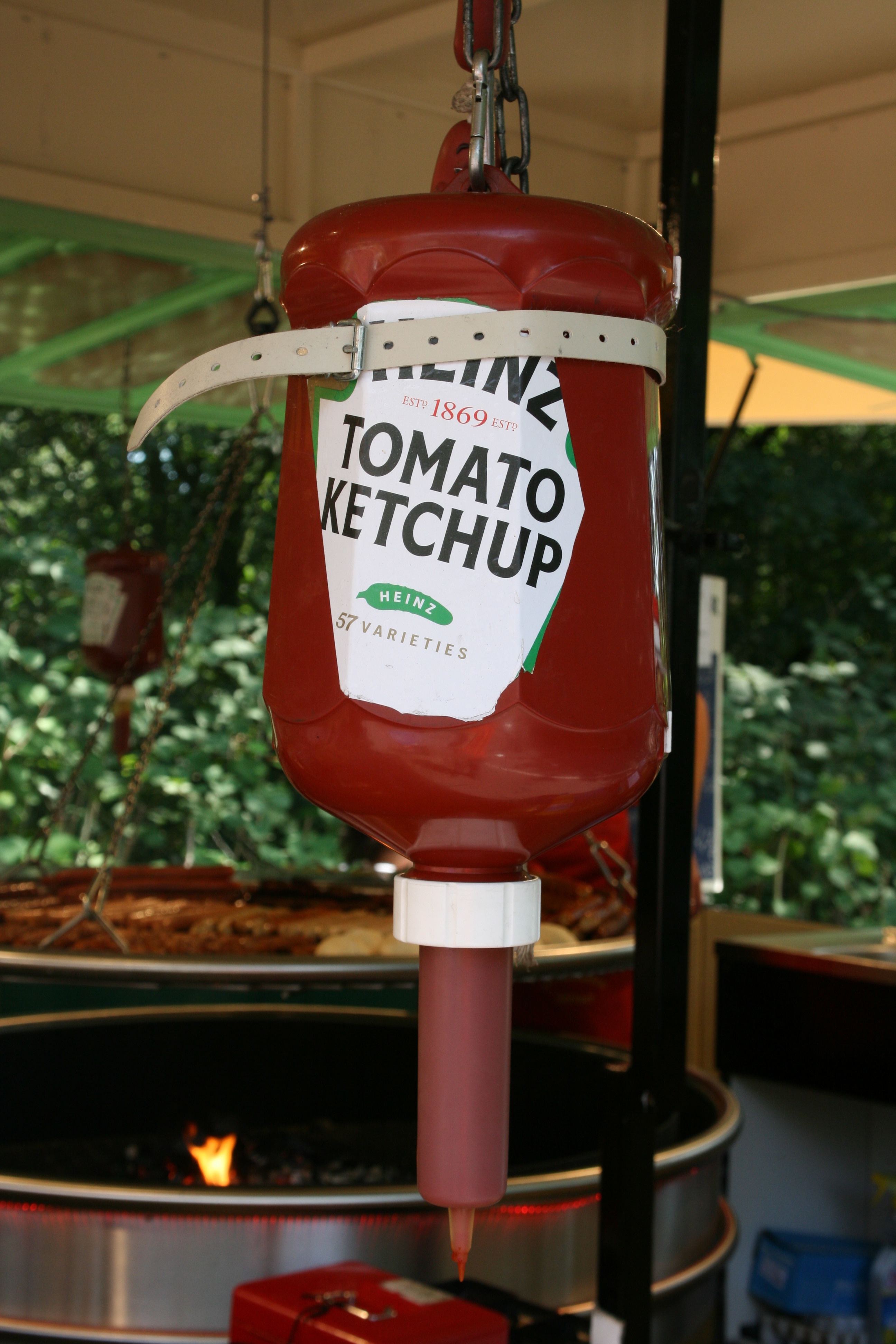 Hubertusweg am Dortmund-Ems-Kanal beim Kanalfestival 2011 in Datteln